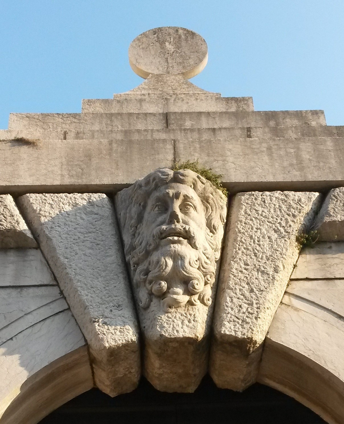 Protome di Cristo sormontata dal Sole di Giustizia. Portale (particolare).